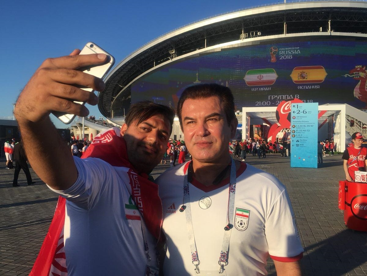 تماشاگران ایرانی در ورزشگاه کازان‌آرنا که برای دیدن دیدار ایران و اسپانیا آمده‌اند